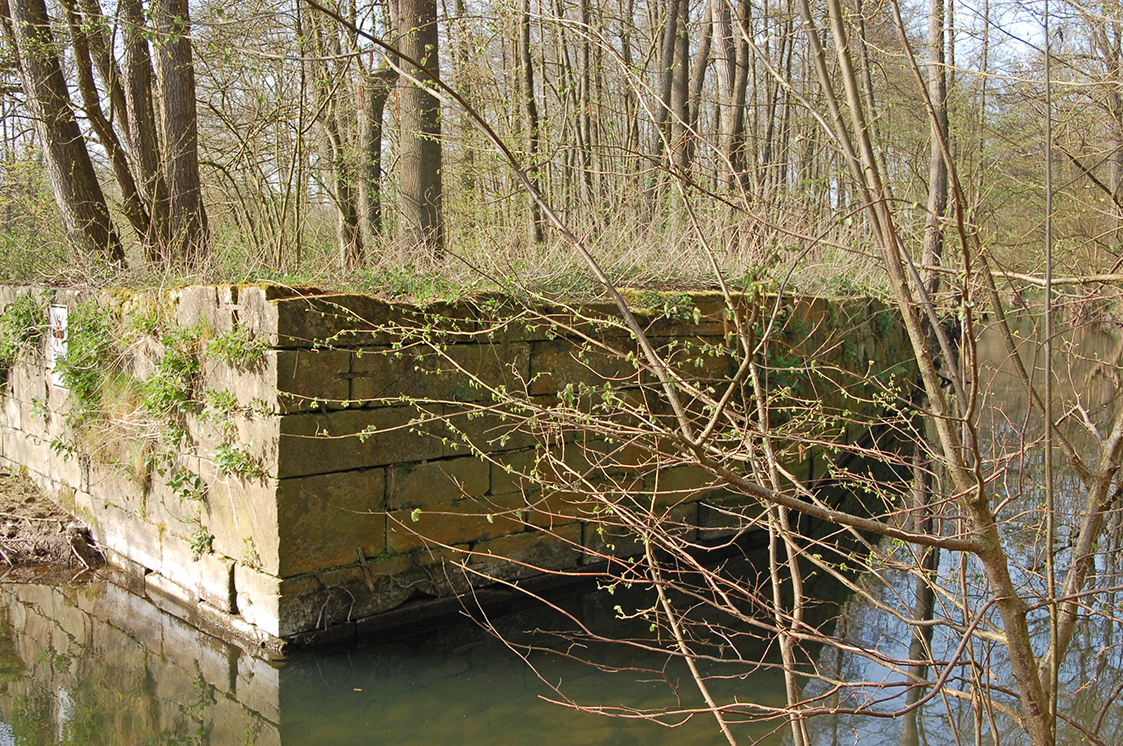 Massives Einlass-Bauwerk am Remminger Flößerkanal